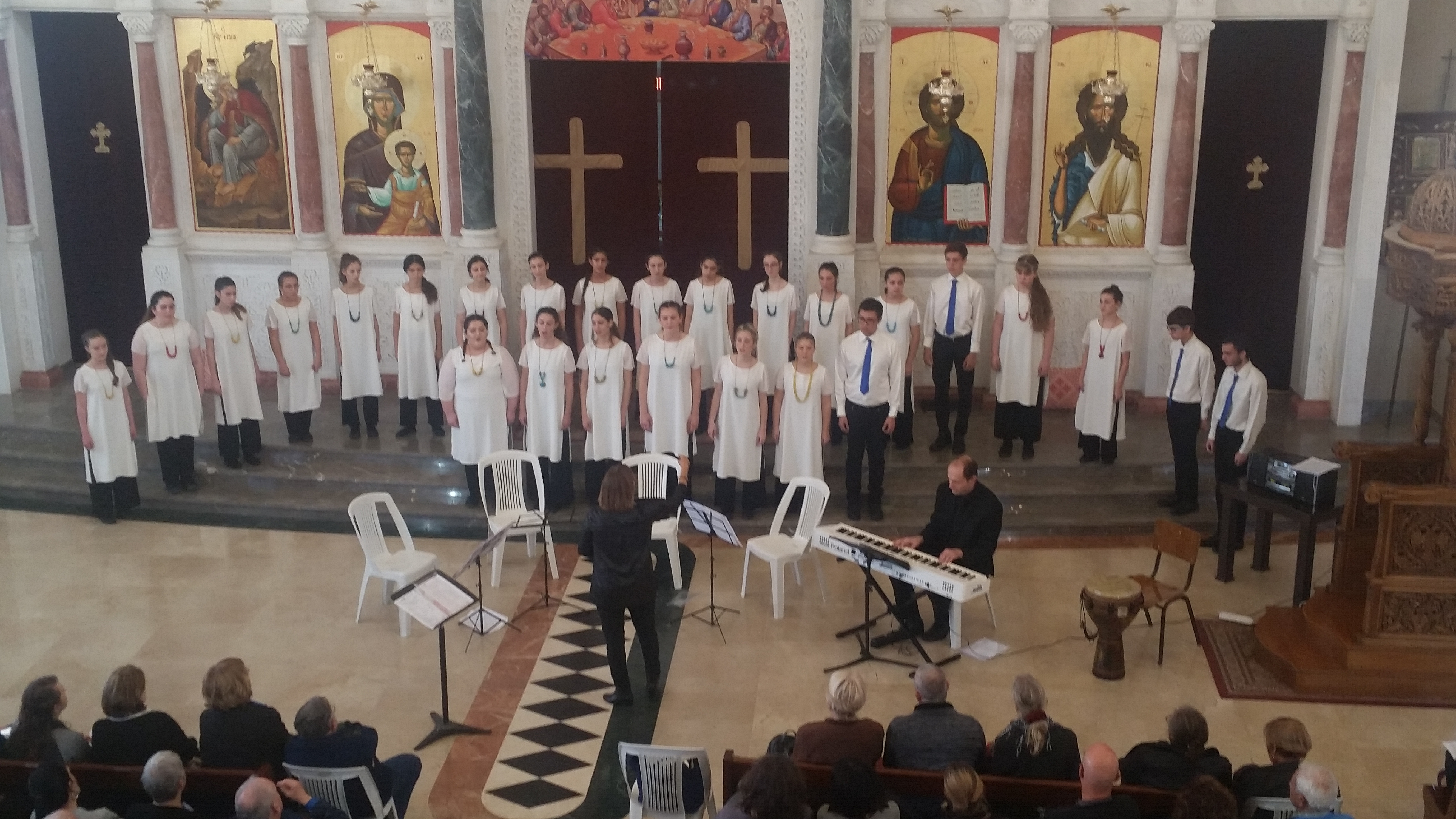 מקהלת מורן עם המנצחת נעמי פארן במופע במסגרת פסטיבל החג של החגים